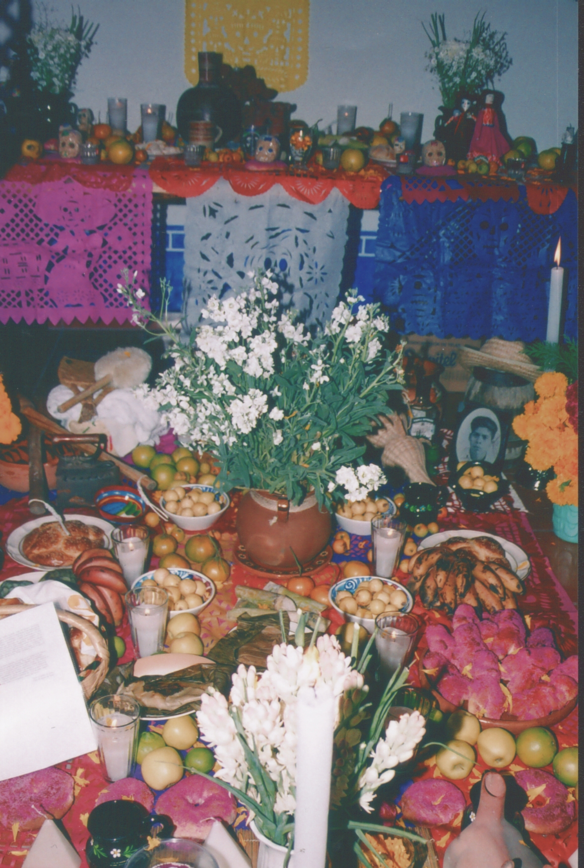 Ofrenda mixteca poblana del día de muertos. Se encuentra dividida en dos altares, uno dedicado para los niños muertos (sobre la mesa) y el otro, para los adultos muertos (sobre un petate, en el suelo)